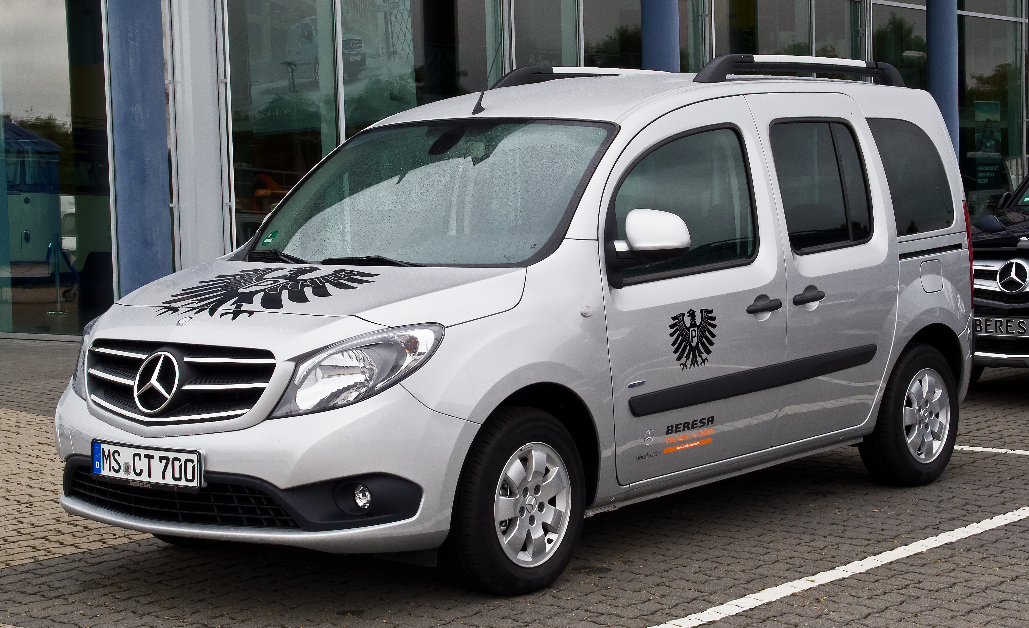 Mercedes-Benz Citan Kombi 109 CDI BlueEFFICIENCY (W 415)